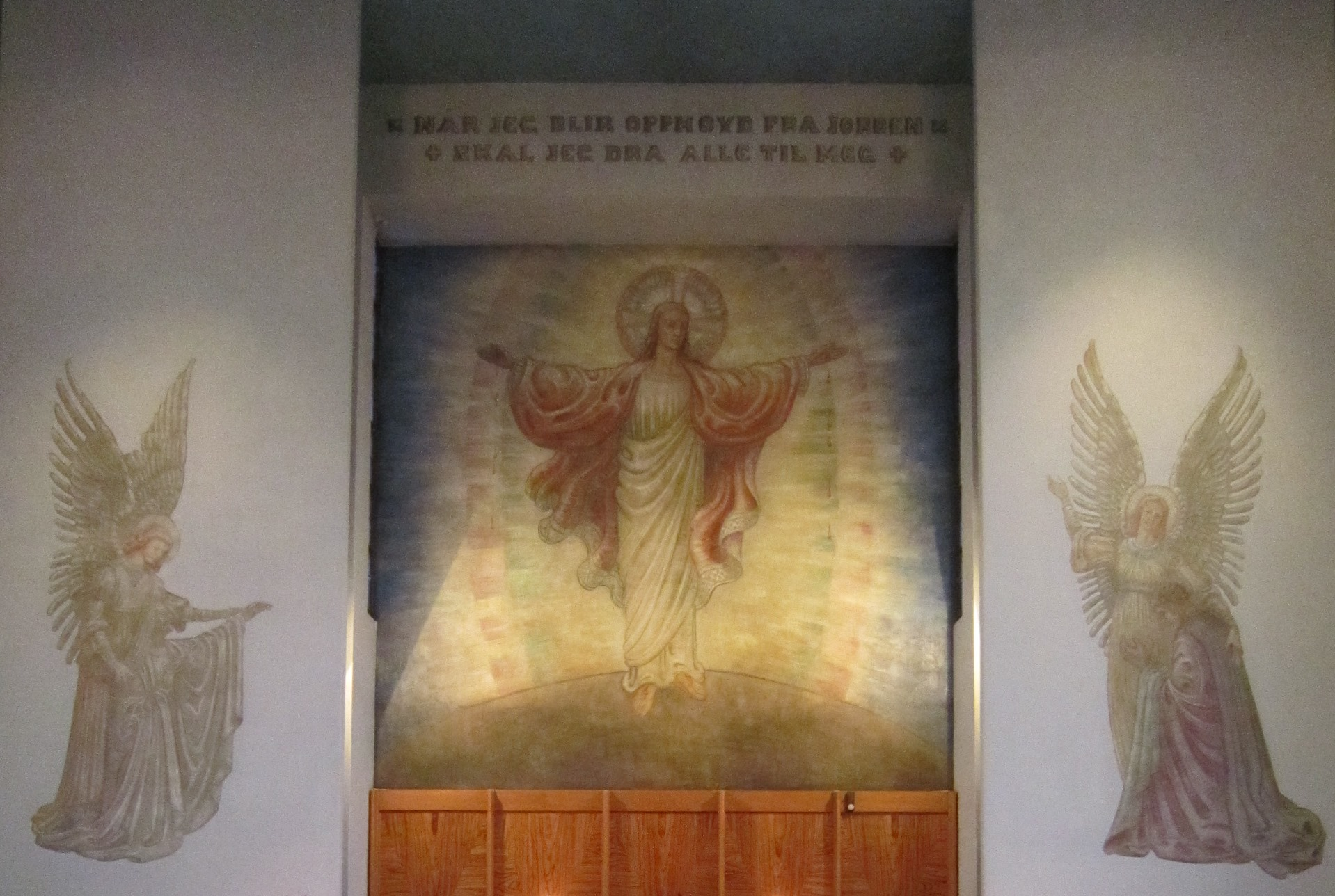 Fondveggen i Hamar krematoriekapell, malt av Per Vigeland